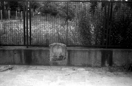 Mittelpunkt des Deutschen Reiches in den Grenzen von 1871-1918. Hier der Originalstein am Originalstandort in der Gartenstraße - Einmündung Mittelstraße in Spremberg/ Brandenburg/ Deutschland. Deutlich ist hier zu erkennen, das 1946 Adler und Schrift zerstört wurden.